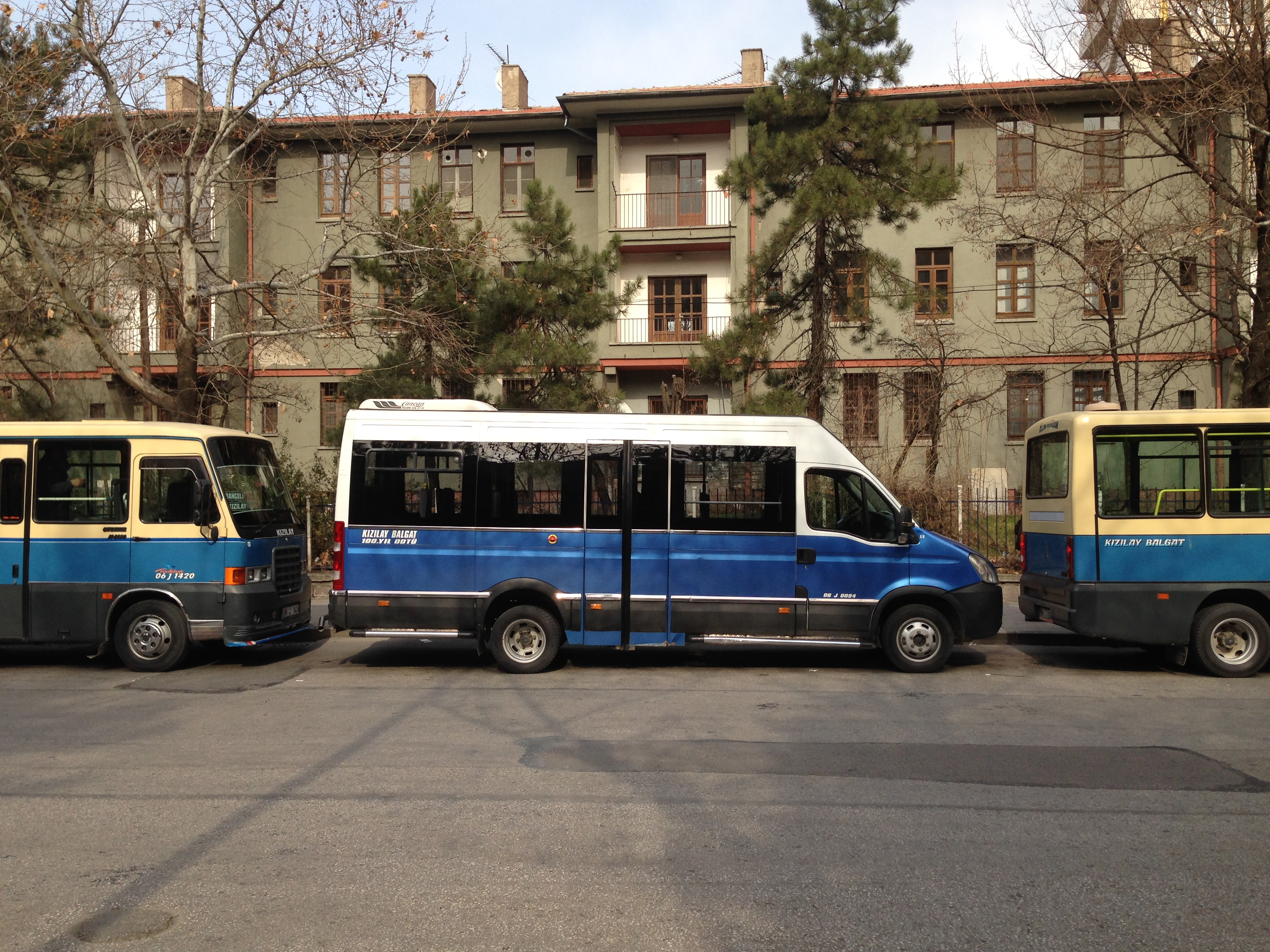 ankara dolmuşları